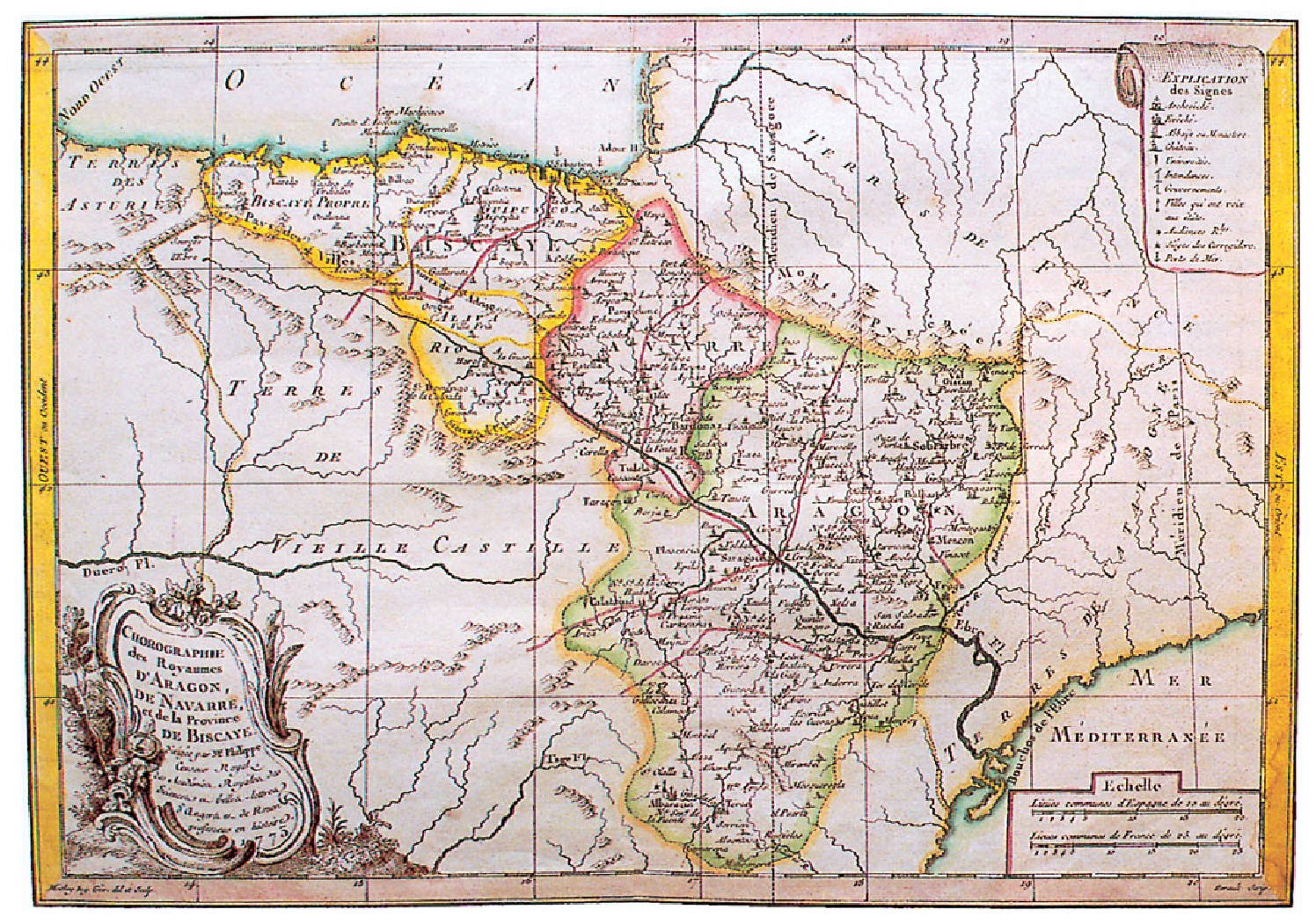 “Chorographie des Royaumes d’Aragon et de la Province de Biscaye. Dirigée par Mr. Philippe”. 1773. Hiru probintziak “Biscaye” izeneko batasun politikoaren barne agertzen dira berriro ere. (Argazkia: J. G. Bilduma: J. R. S.).